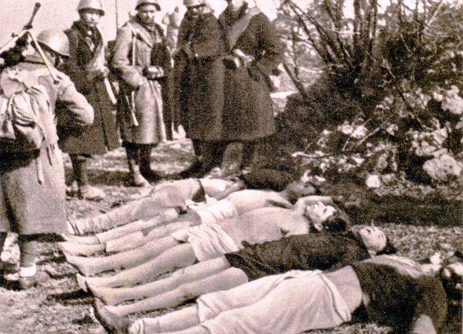 Italijanski vojaki si ogledujejo mrtve talce